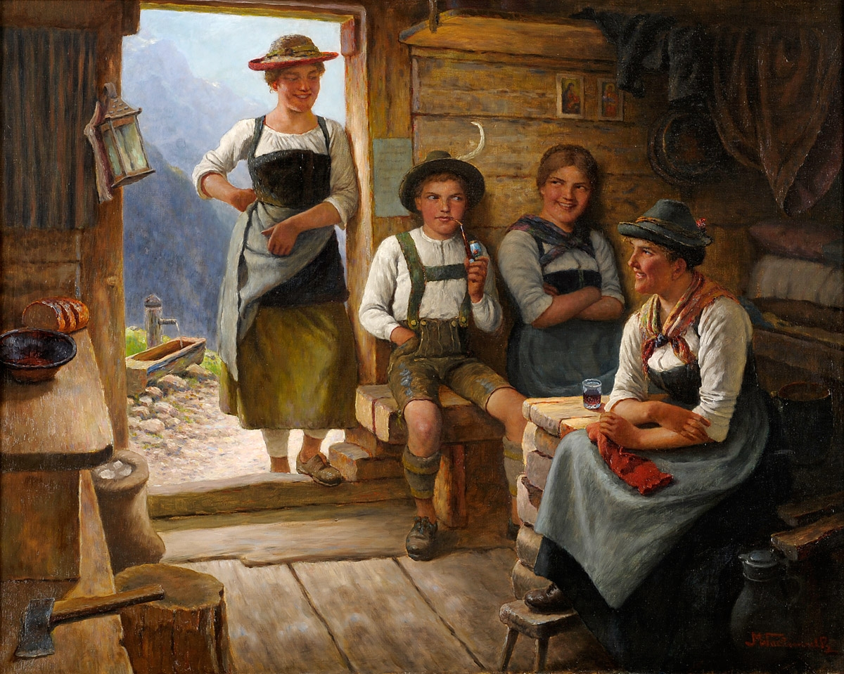 Eine gesellige Runde. Signiert. Öl/Lwd., 70 x 88 cm